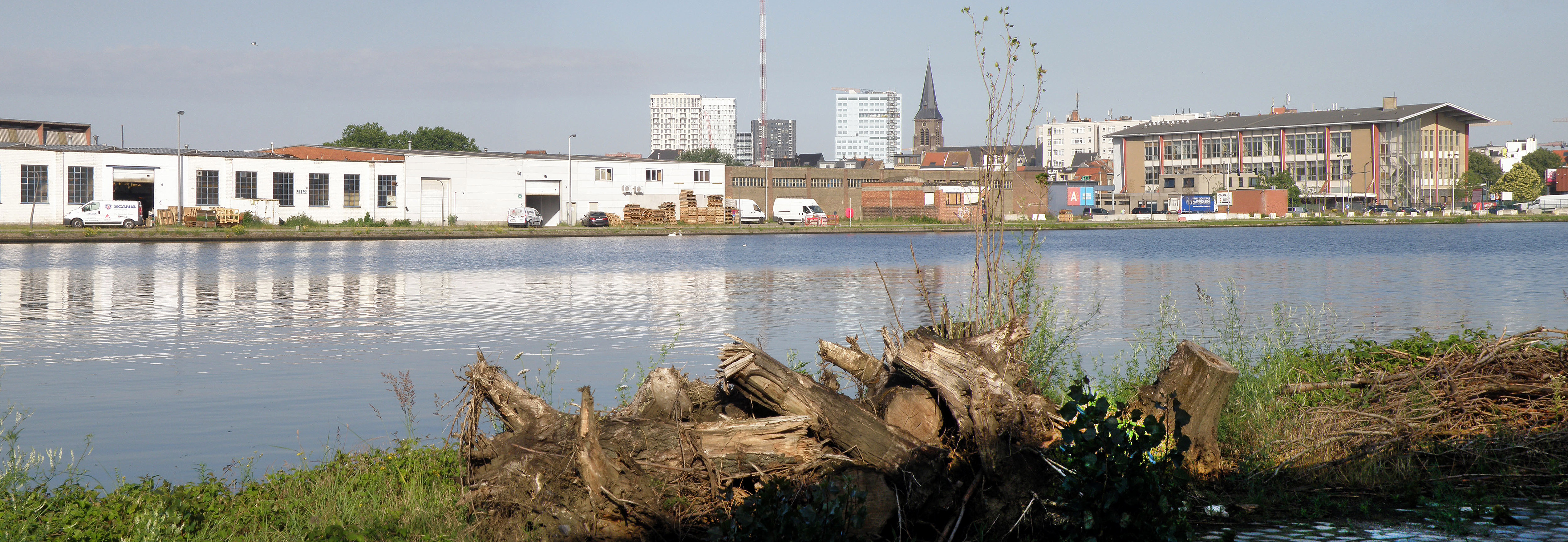 Antwerpen (België). Lobroekdok anno 2020. Zicht op zuidzijde met o.m. slachthuis en klokkentoren van Sint-Lambertuskerk aan de Lobroekstraat.